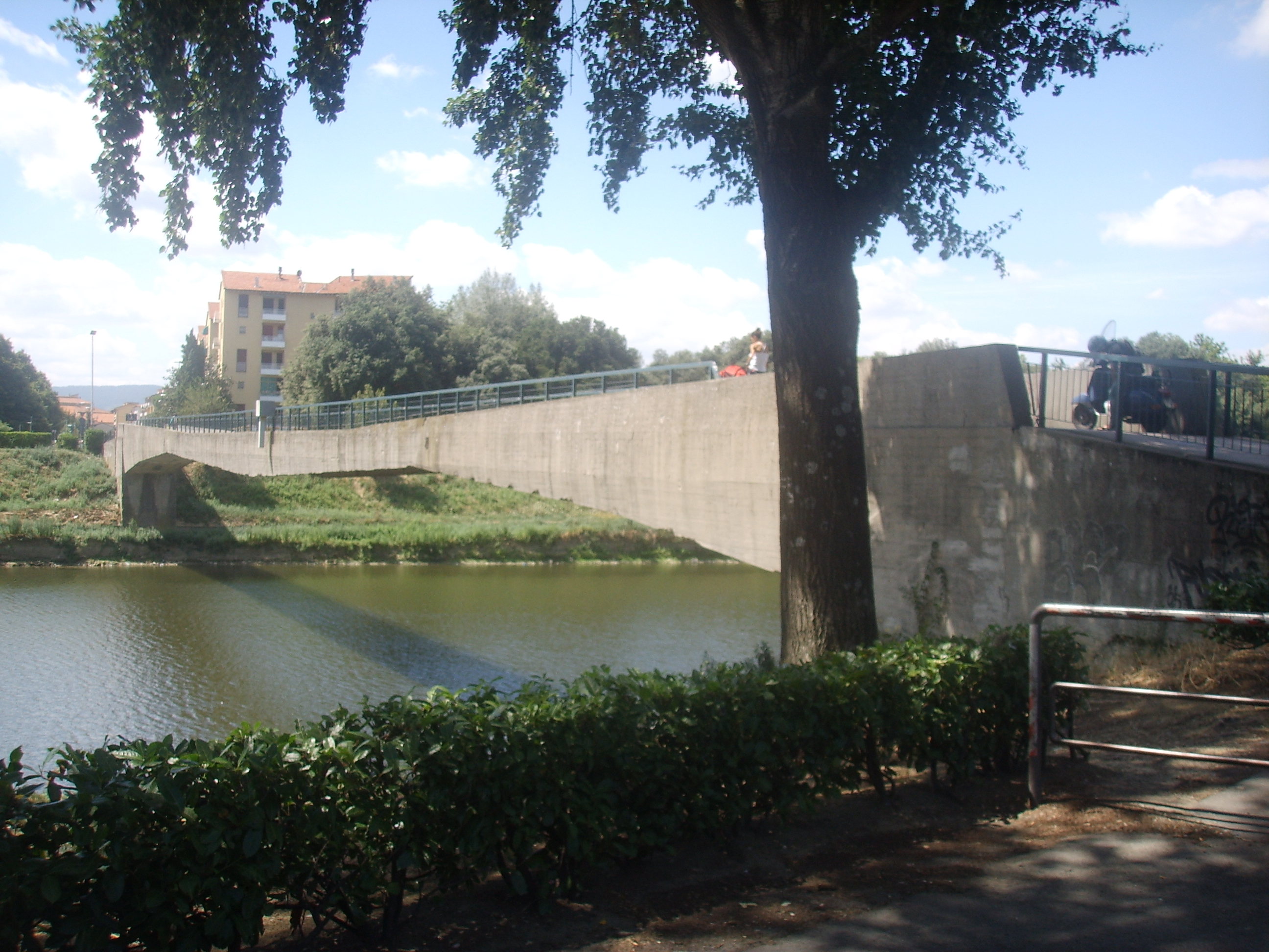 Passerella dell'Isolotto bridge in Florence, Italy